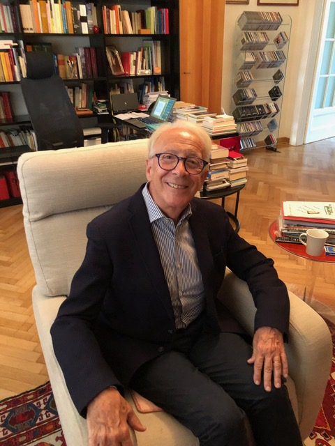 Pierluigi Sabatti